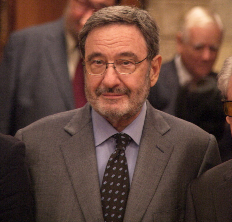 Acte de lliurament de la Medalla d'Or al Mèrit Esportiu de l'Ajuntament de Barcelona a Enric Truñó i Lagares. 6 d'octubre de 2015